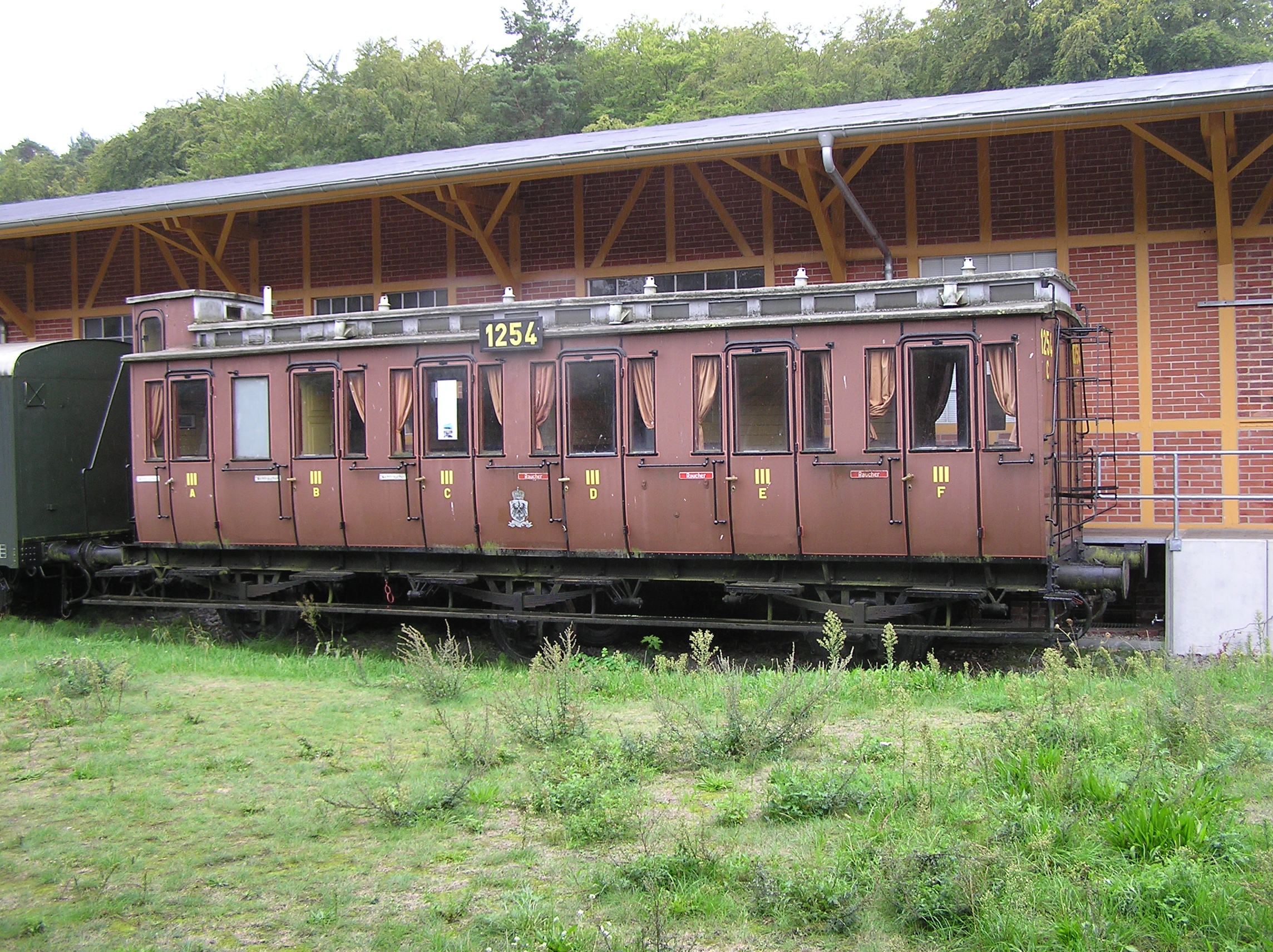 preuss_Abteilwagen_C3 (im Bahnhof Heringsdorf/Usedom).